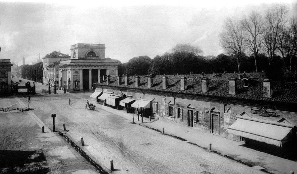 1870: fotografia del Lazzareto ancora integro, Porta Venezia e il vialone che diventerà corso Buenos Aires